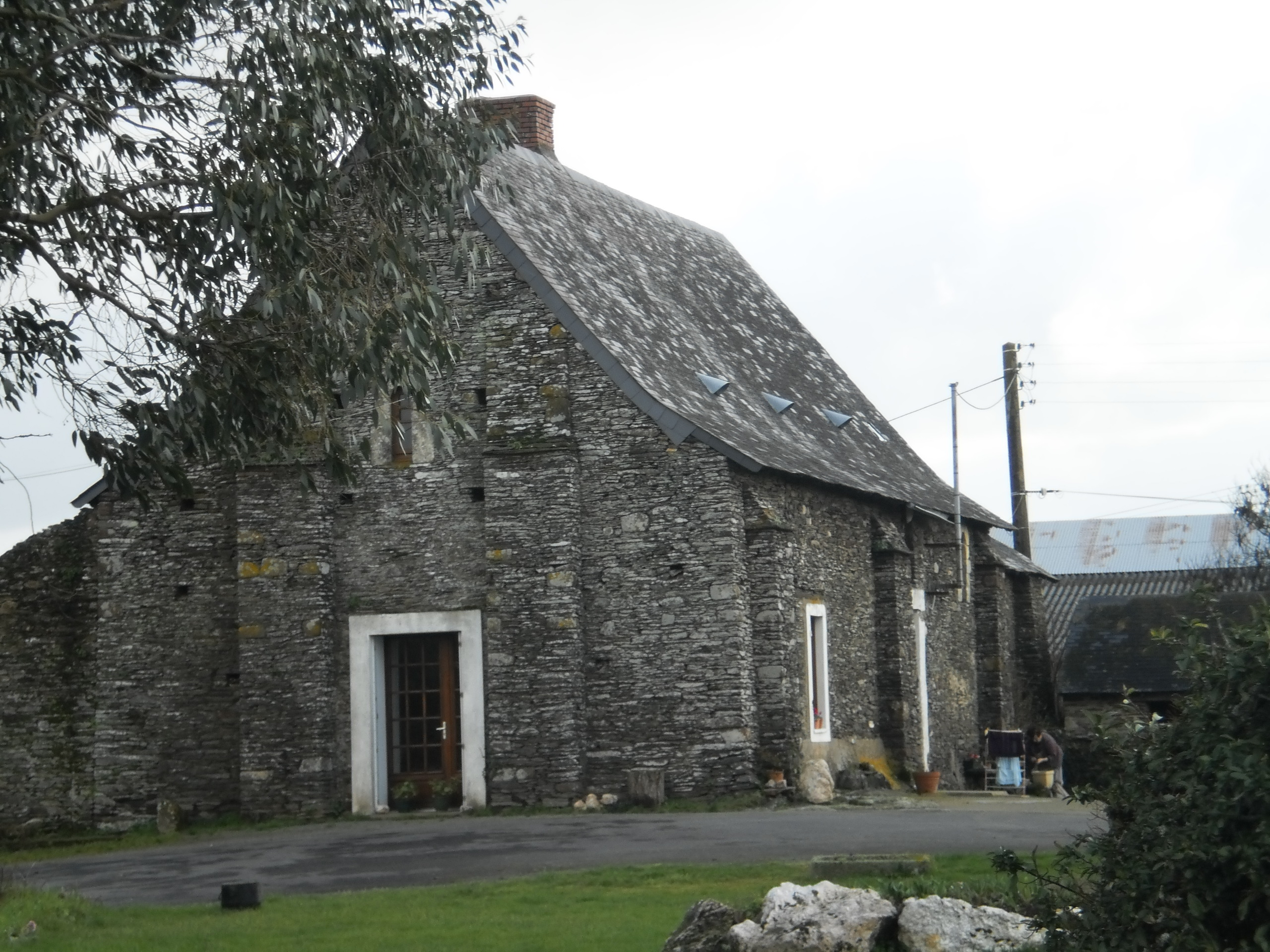 Le Pin (Loire-Atlantique, France) - ancienne église de Rochementru